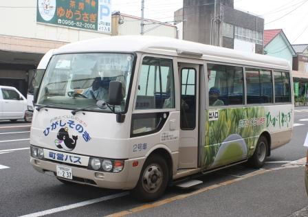 東彼杵町営バス